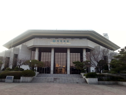 부천시민회관. 경기도 부천시 부일로 365 (지번주소 : 경기도 부천시 중동 788)